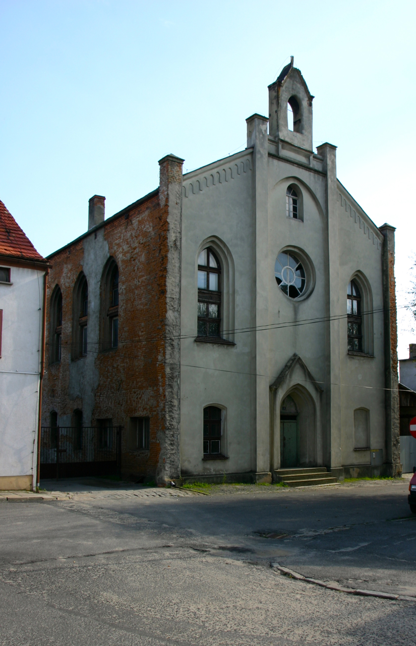 Biała (dodatkowa nazwa w j. niem. Zülz) – to miasto w woj. opolskim, w powiecie prudnickim.